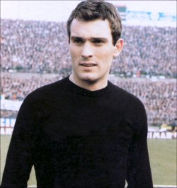 Italian goalkeeper Lido Vieri